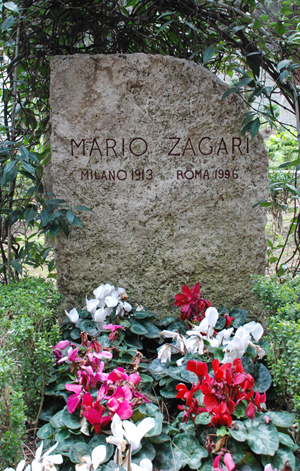 Giuliano Cianfrocca, Tomba di Mario Zagari al Cimitero degli acattolici di Roma.